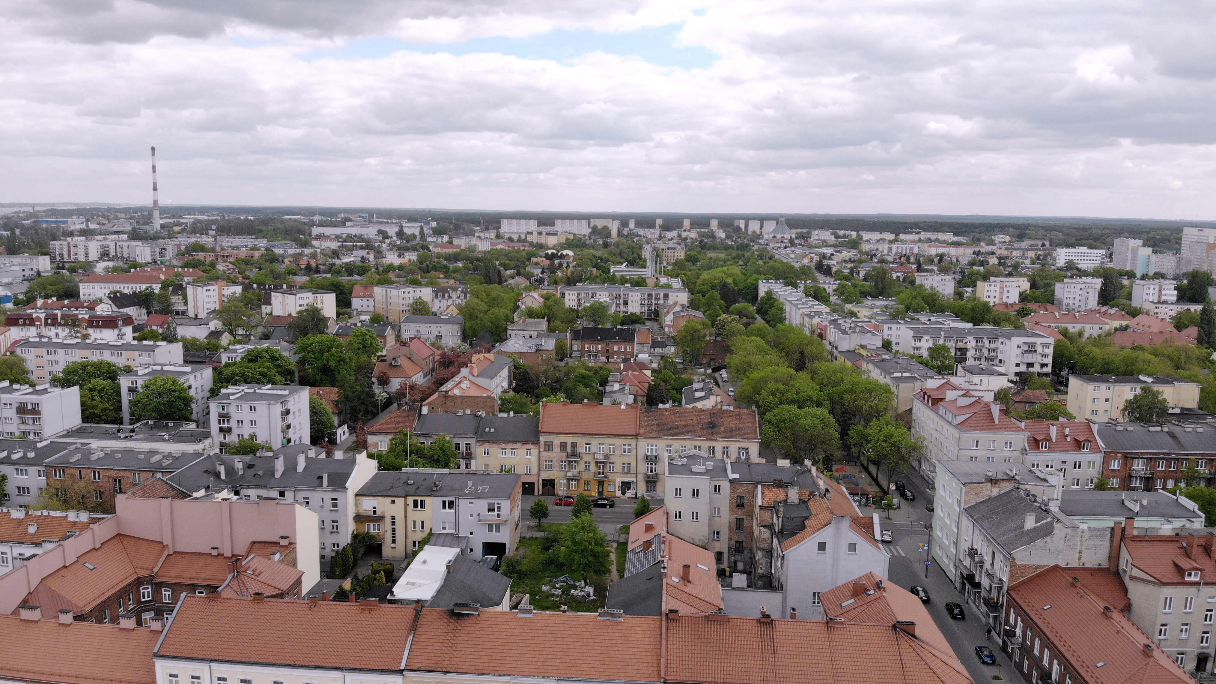 Śródmieście (2020 r.)